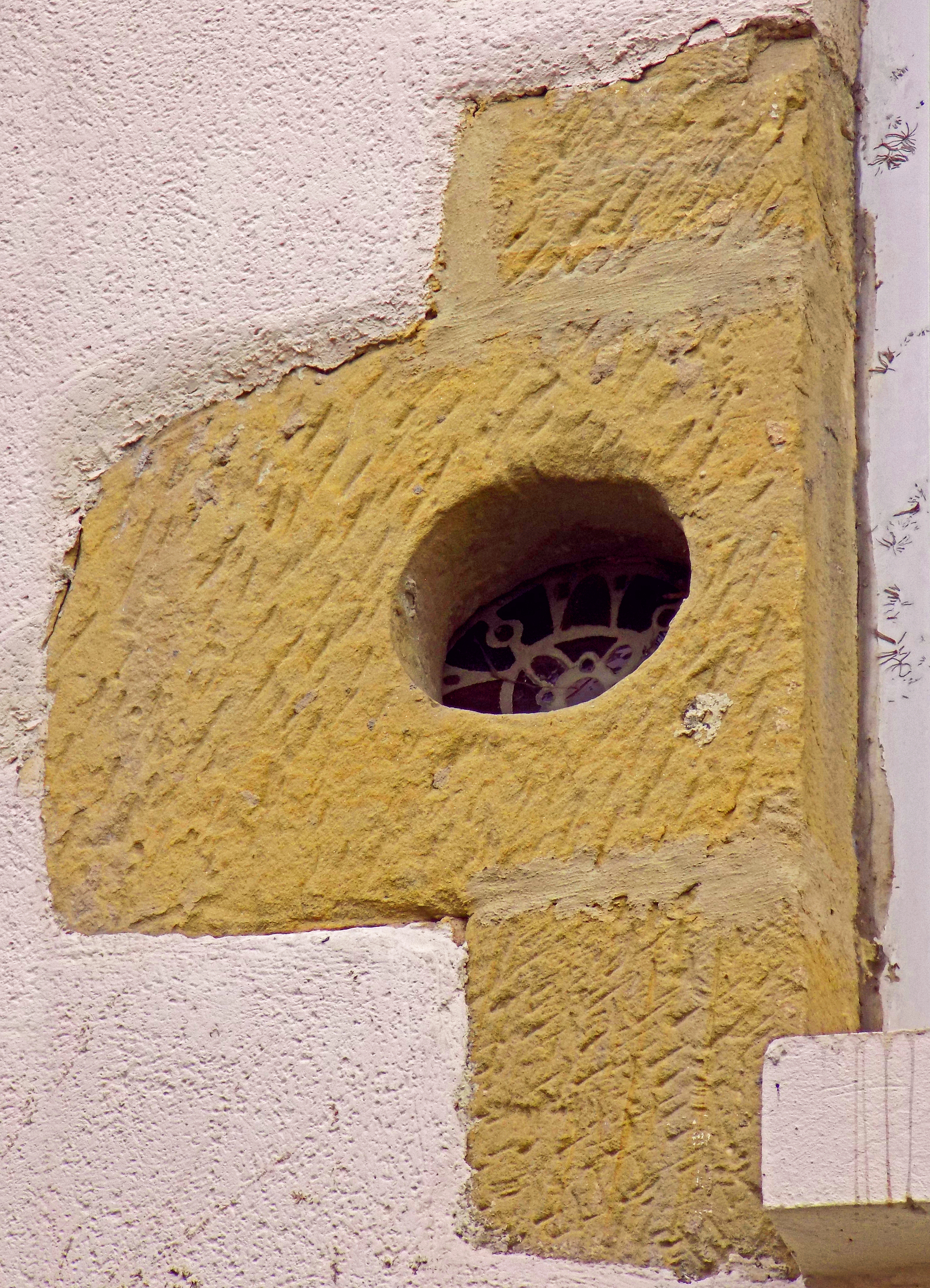 Hagioscope, église Saints-Pierre-et-Paul, Saint-Avold (Moselle). XIIIe.